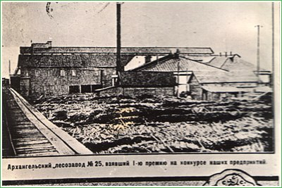 Архангельский лесозавод № 25, взявший 1ю премию на конкурсе предприятий 1928 год